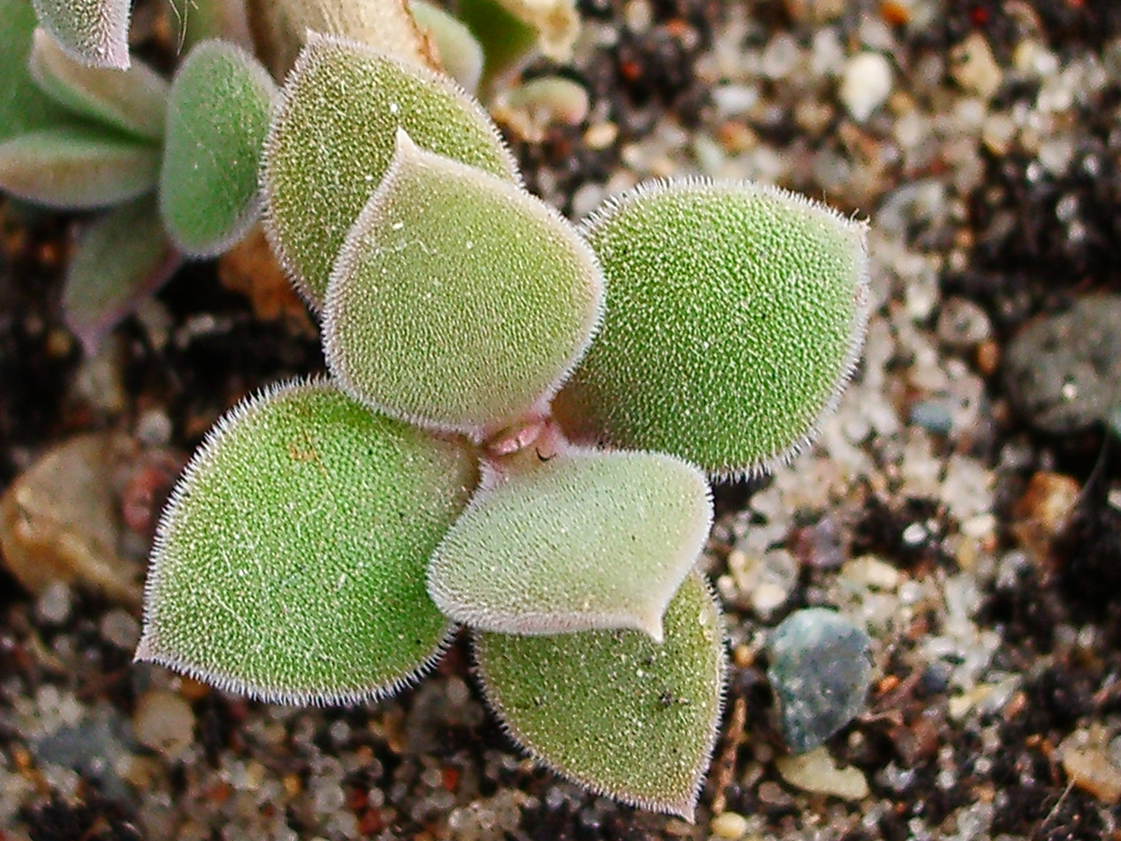 Leafs of Delosperma jansei (tradescantioides?)